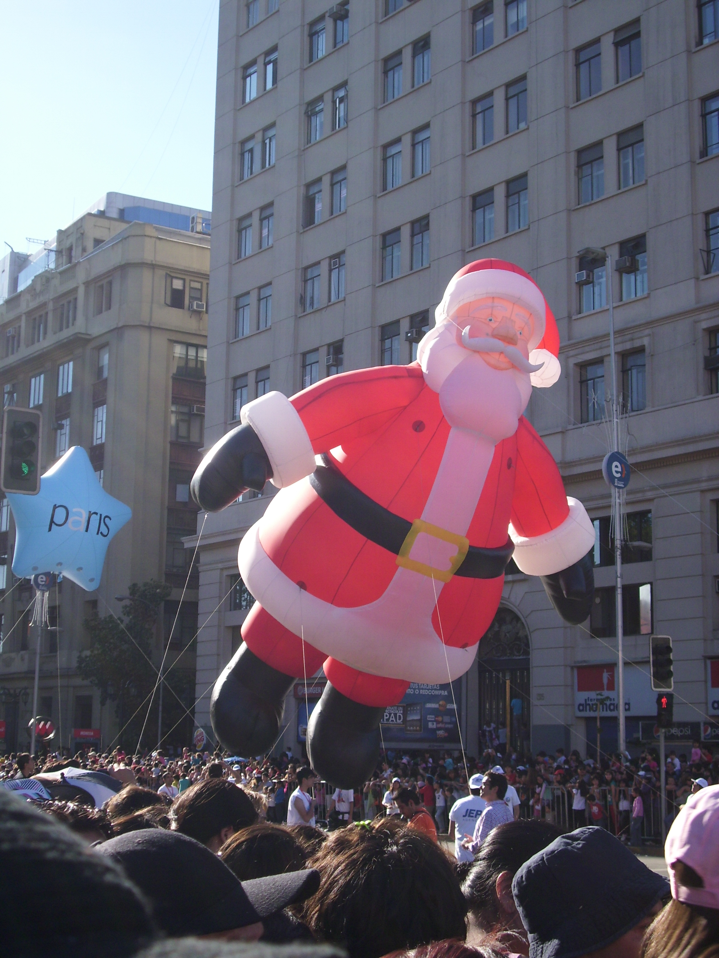 Un globo gigante del Viejo Pascuero (Santa Claus, San Nicolás, etc.) pasando frente al Palacio de La Moneda durante el desfile navideño París Parade 2010, llevado a cabo en la Avenida del Libertador Bernardo O'Higgins el 12 de diciembre de 2010. Santiago de Chile.